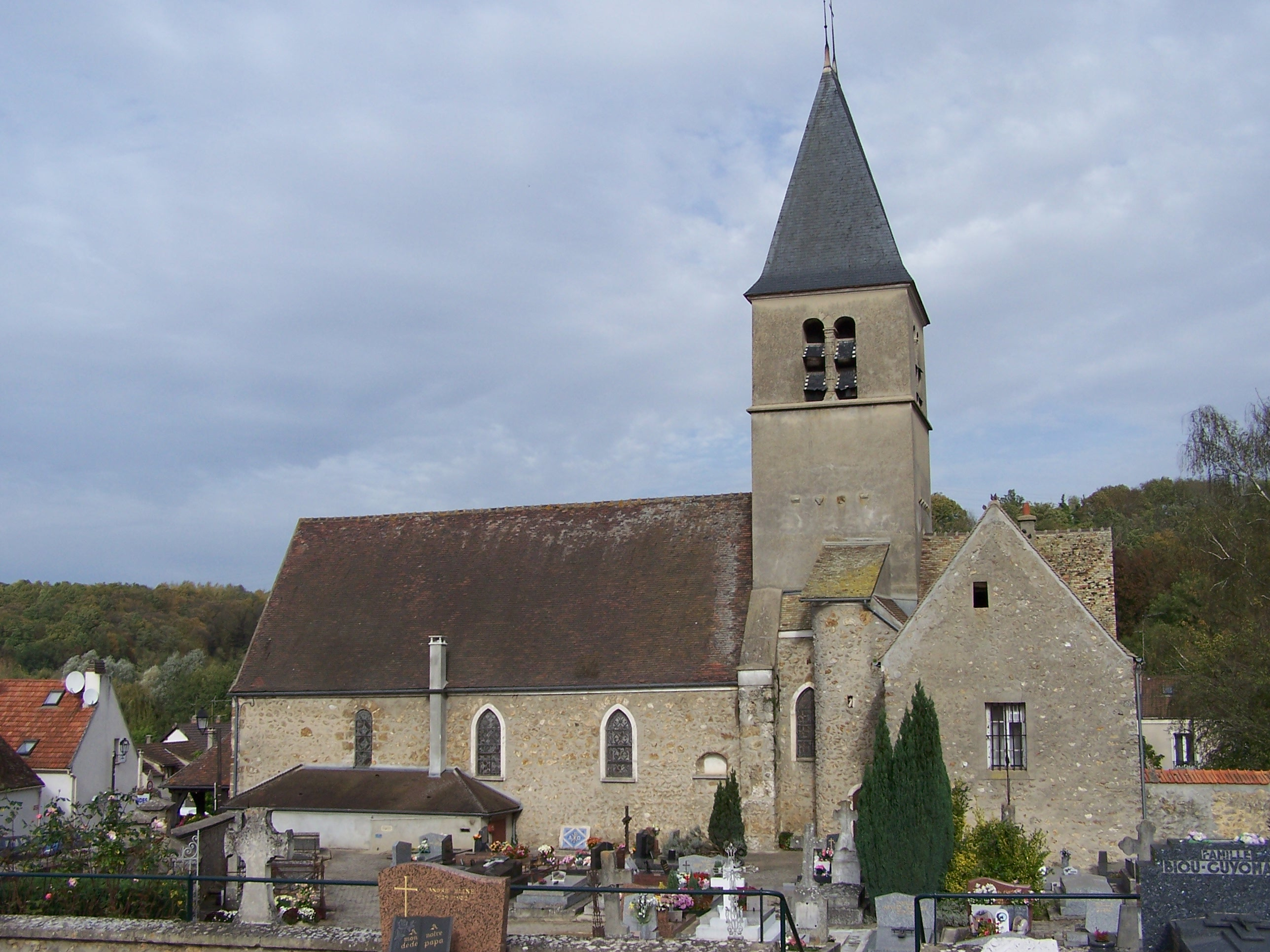 Église Saint-Médard d'Élancourt (Yvelines, (France)